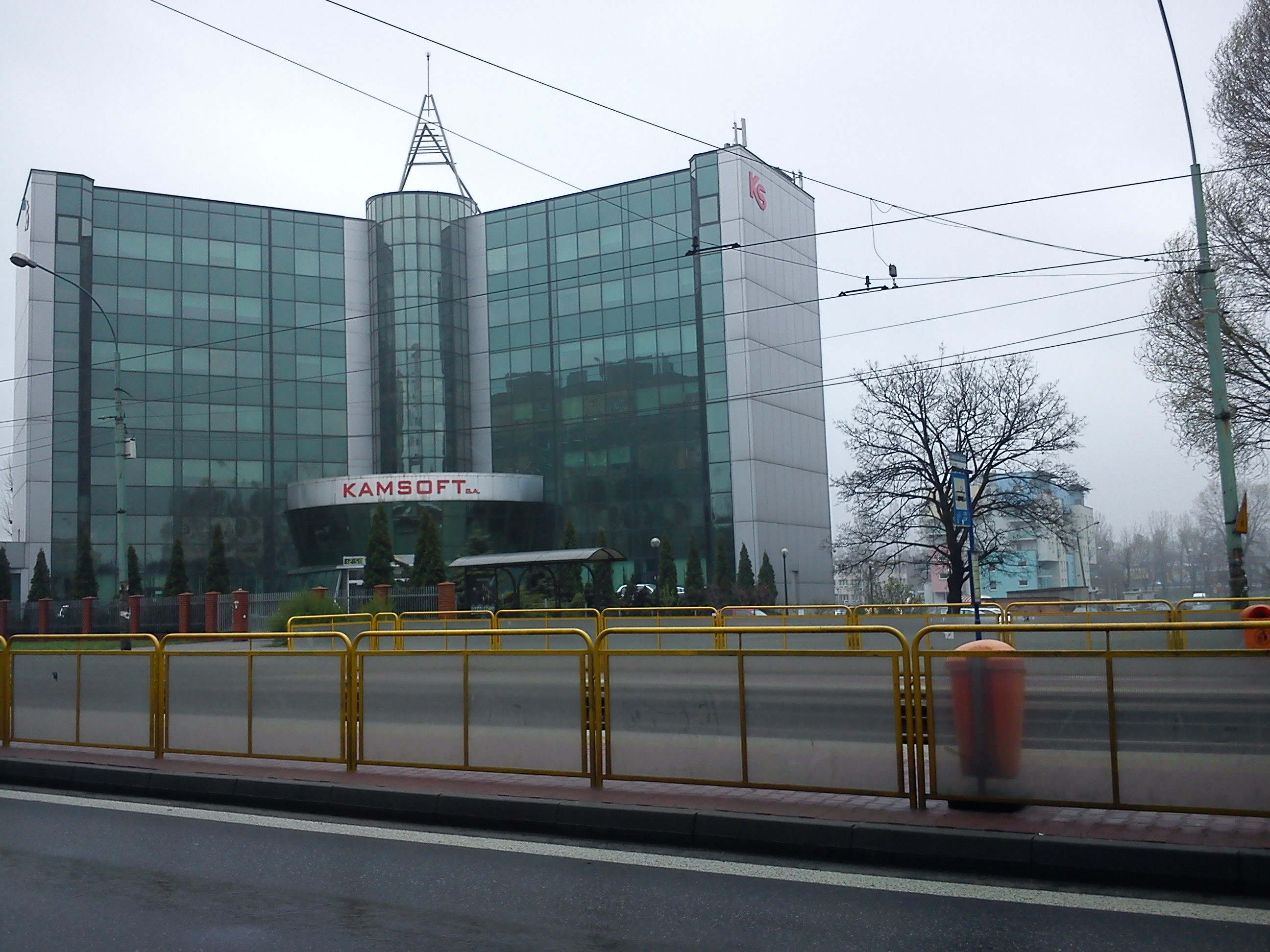 Katowice-Zawodzie.Biurowiec Kamsoft S.A.